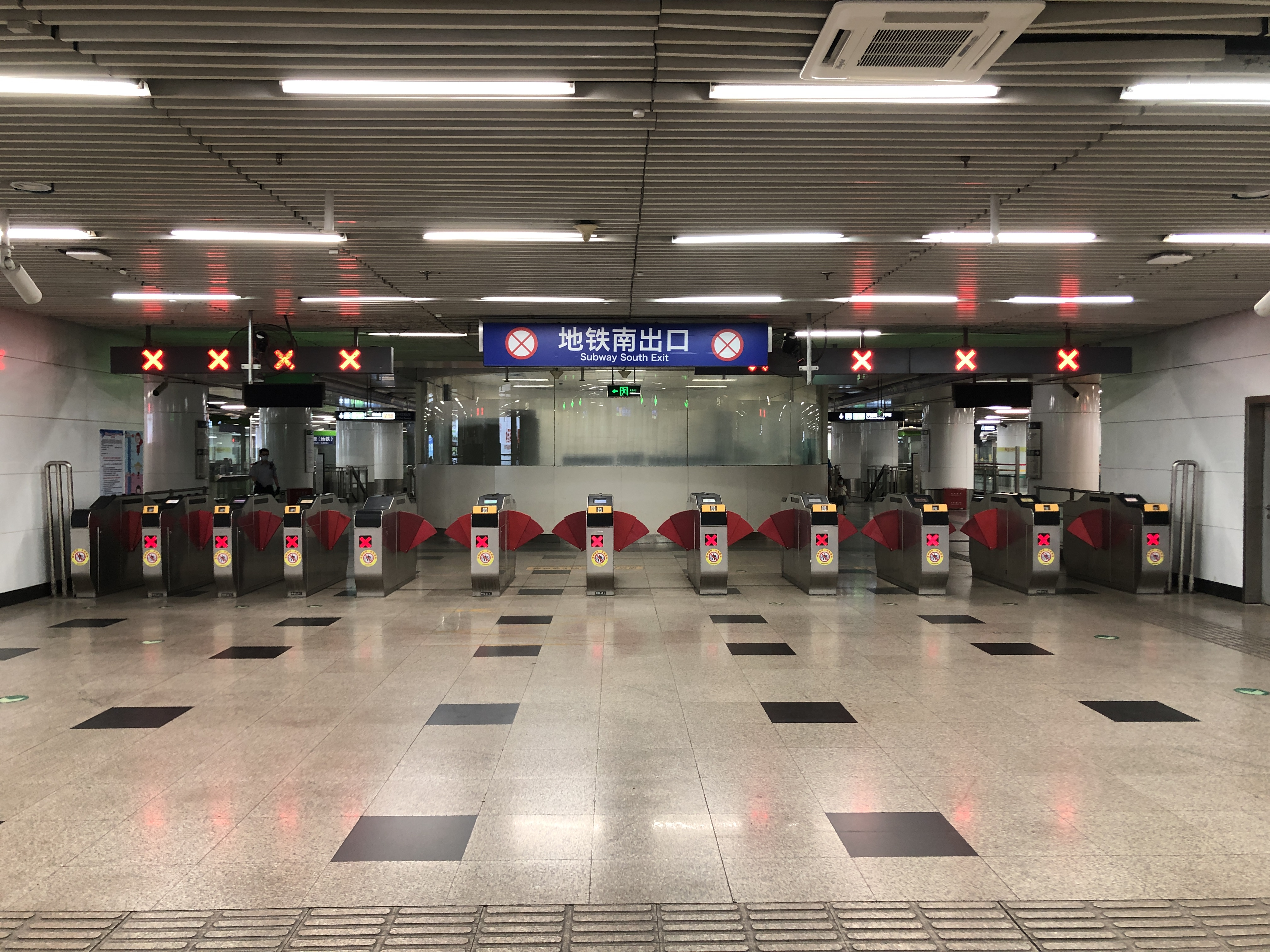 中文（中国大陆）: 北京地铁北京西站B口